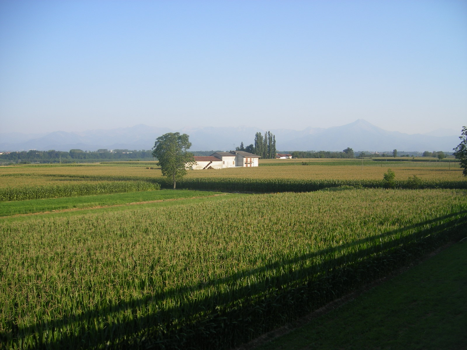 Landscape at Murazzo (Fossano municipality)